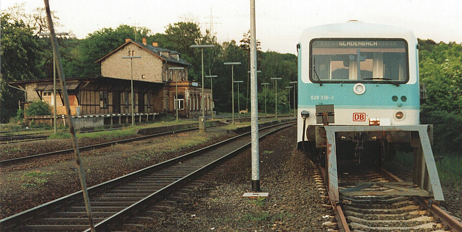 Sonntagsruhe im Bahnhof von Gladenbach. 628 330-3 ruht sich in Gleis 4 im Mai 1995 aus. Links ist der Güterschuppen gut erkennbar. Direkt dahinter das bis Mai 1995 besetzte Empfangsgebäude. Durch Weichenrückbauten in den früher 1990er Jahren waren nur zwei Gleise für Zugkreuzungen und ein Abstellgleis als verkürztes Stumpfgleis in Gladenbach verblieben.